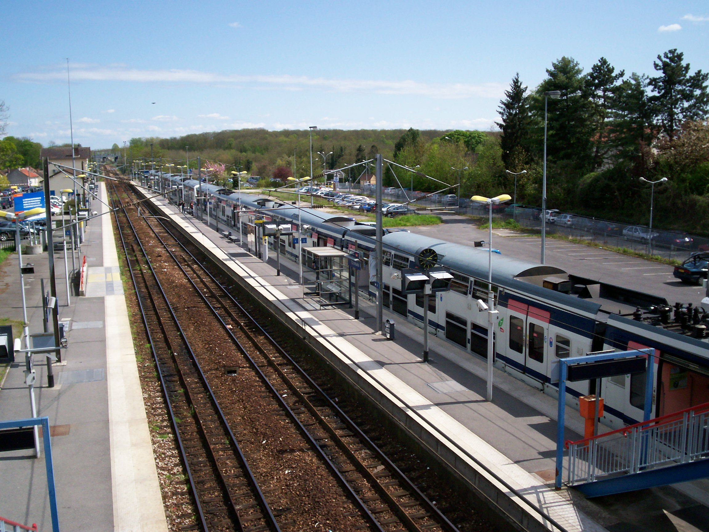 Vue aérienne de la gare de Tournan ainsi qu'un train Z22500